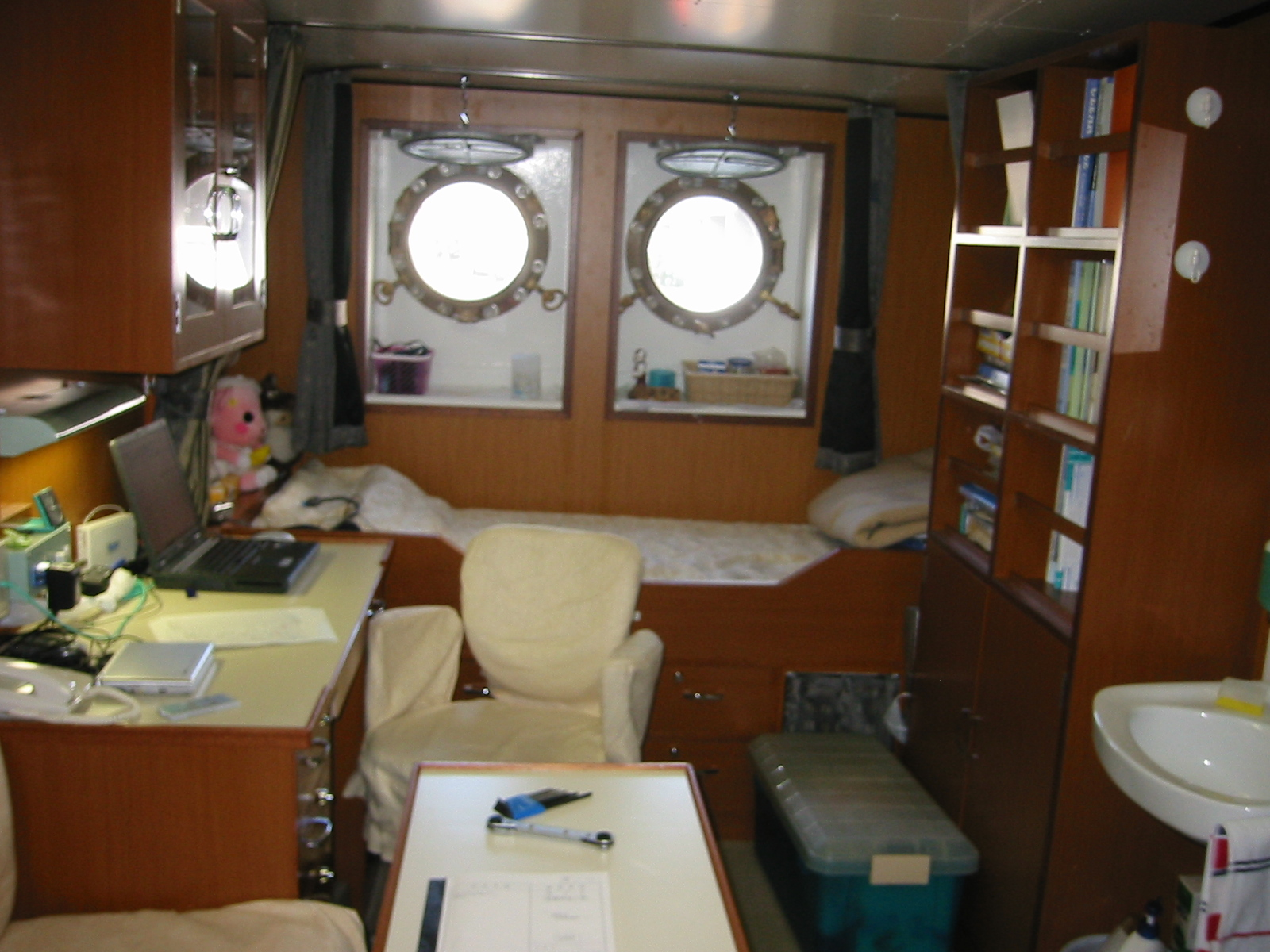 海王丸II世 メリケンパーク中突堤にて